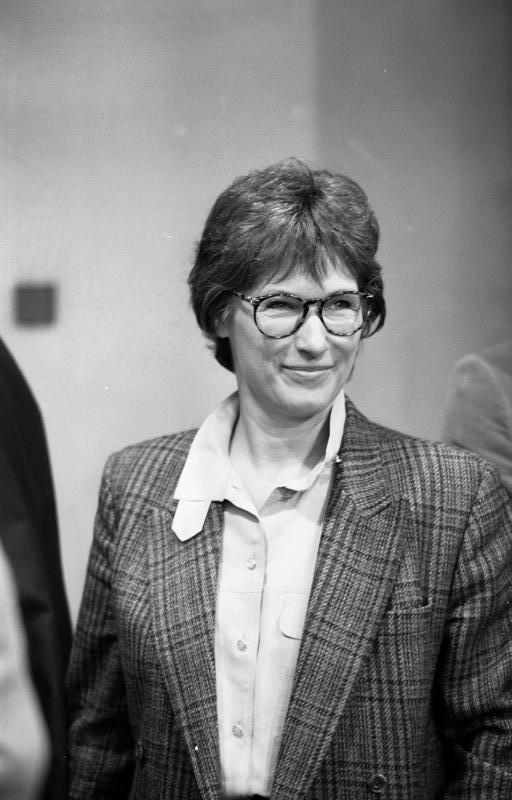 10.1.1991 Sitzung der FDP-Bundestagsfraktion im Bundeshaus (Neues Abgeordneten Hochhaus).